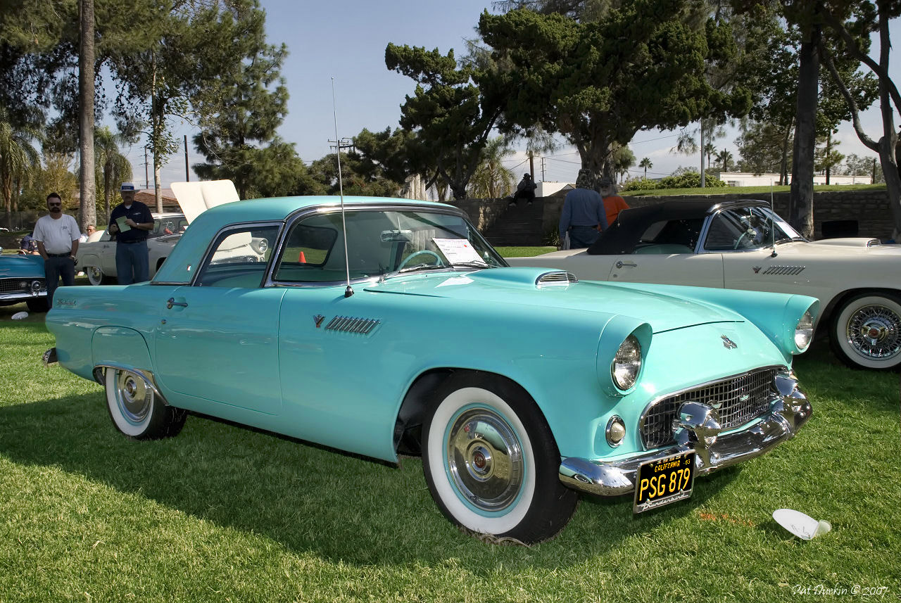 1955 T-Bird, aqua